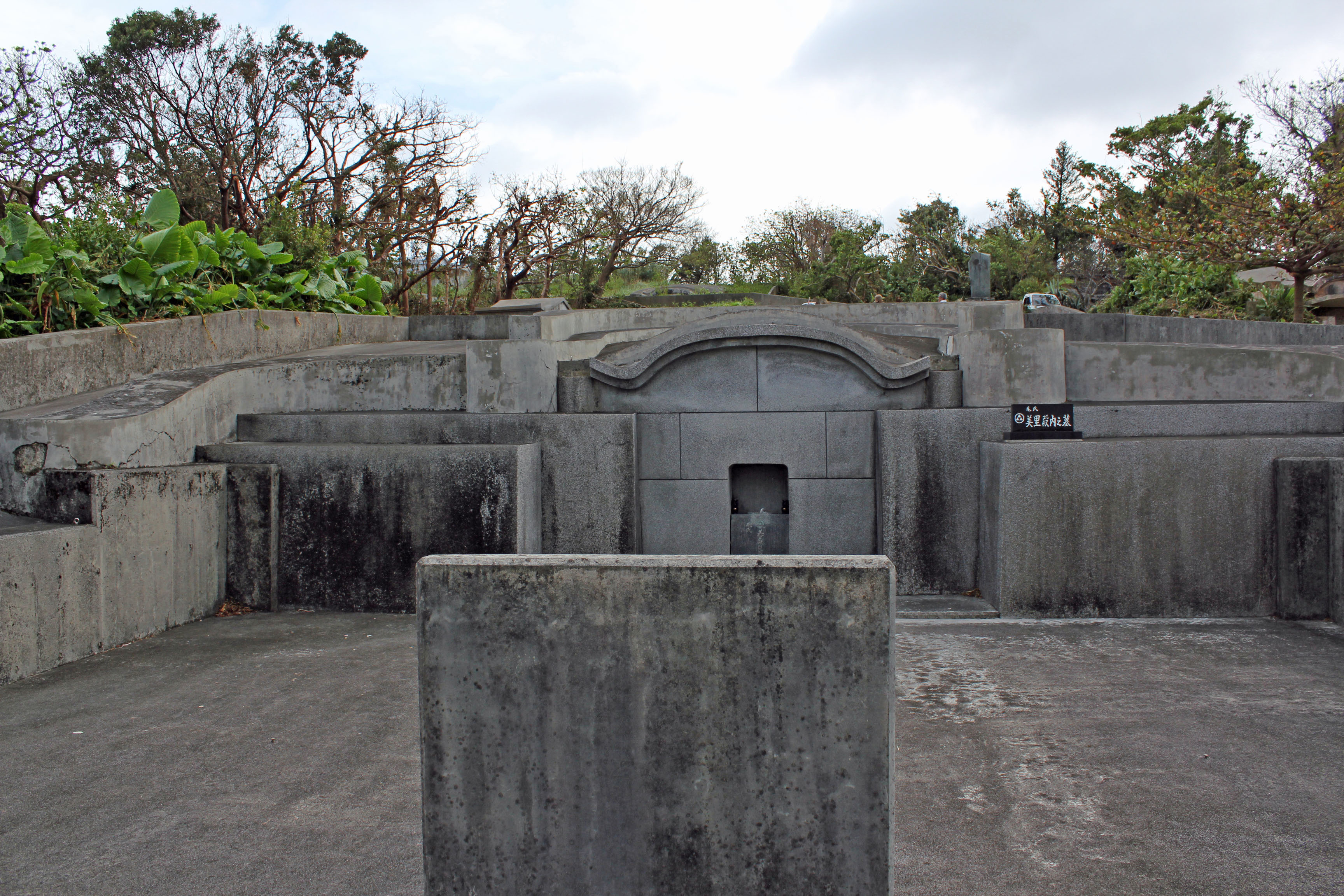 毛氏美里殿内の墓（沖縄県那覇市）